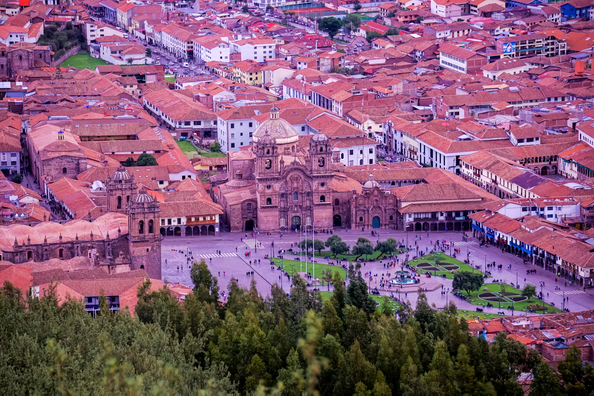 Fotografía de la plaza de armas de la ciudad del Cuzco, capturado desde la ciudadela de Saqsayhuamán. Se puede apreciar el Qoricancha.